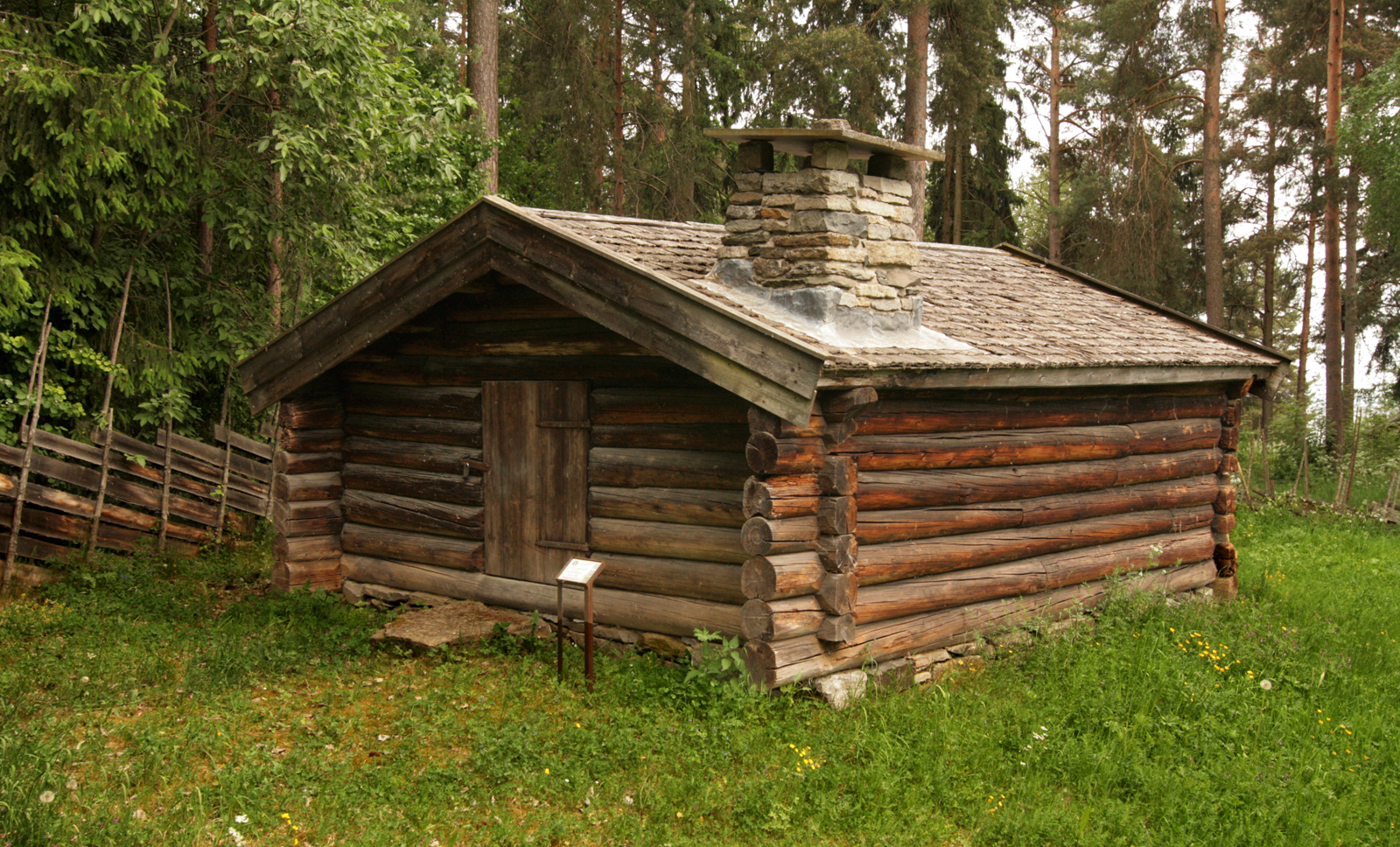 Seterhus for garden Klafstad på Nysetra i Romedal allmenning, Stange. Bygd omkring 1830. Huset har ett rom; setra hadde mjølkebu i eget hus. I dag på Hedmarksmuseet, Hamar.